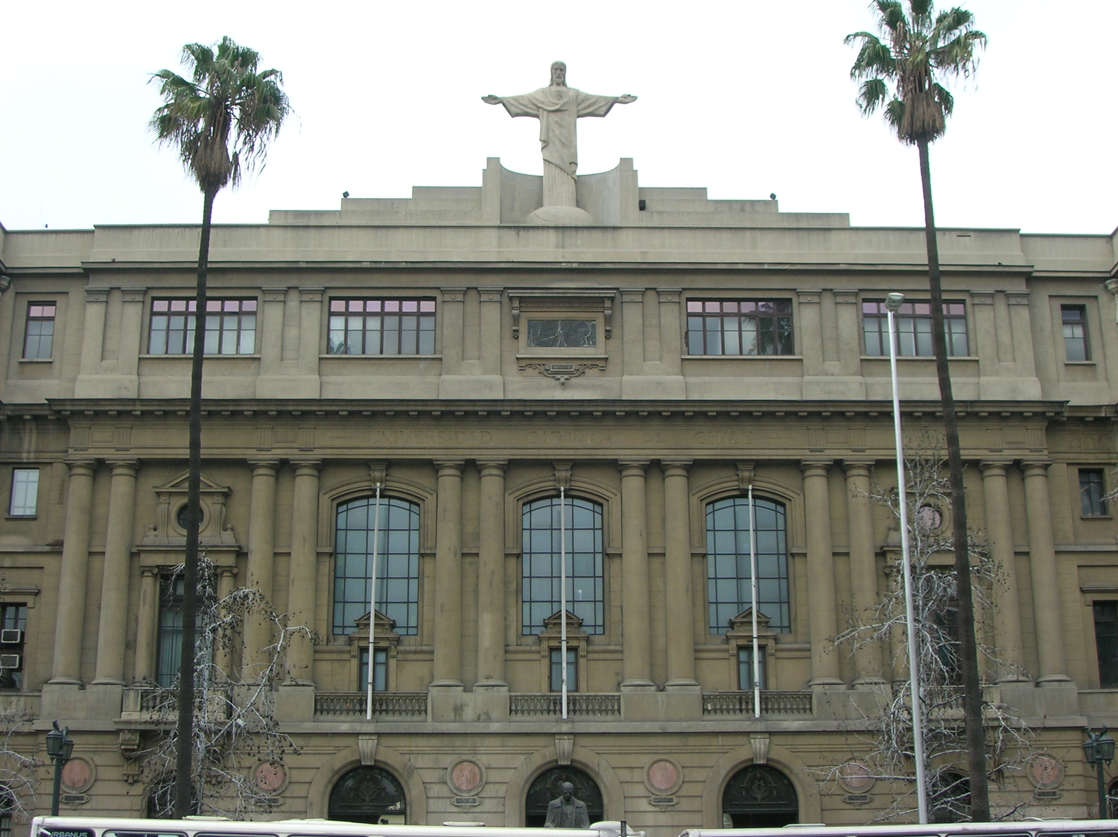 Frontis Casa Central Pontificia Universidad Católica de Chile